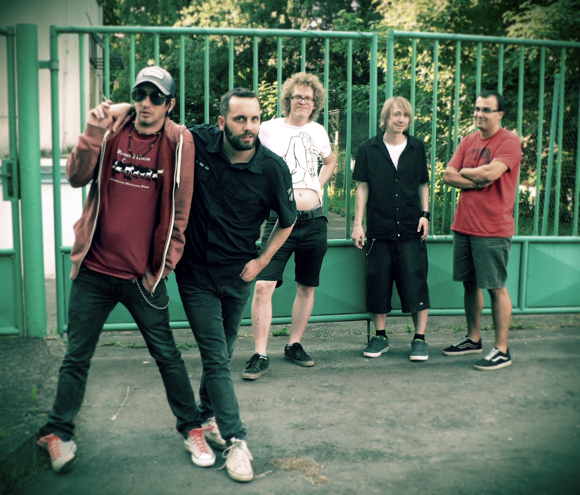 Houba 2015 promo